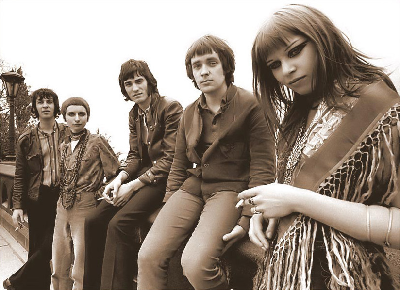 Die City Preachers 1970 - Jean-Jacques Kravetz, Dagmar Krause, Karl-Heinz Schott, Udo Lindenberg und Inga Rumpf